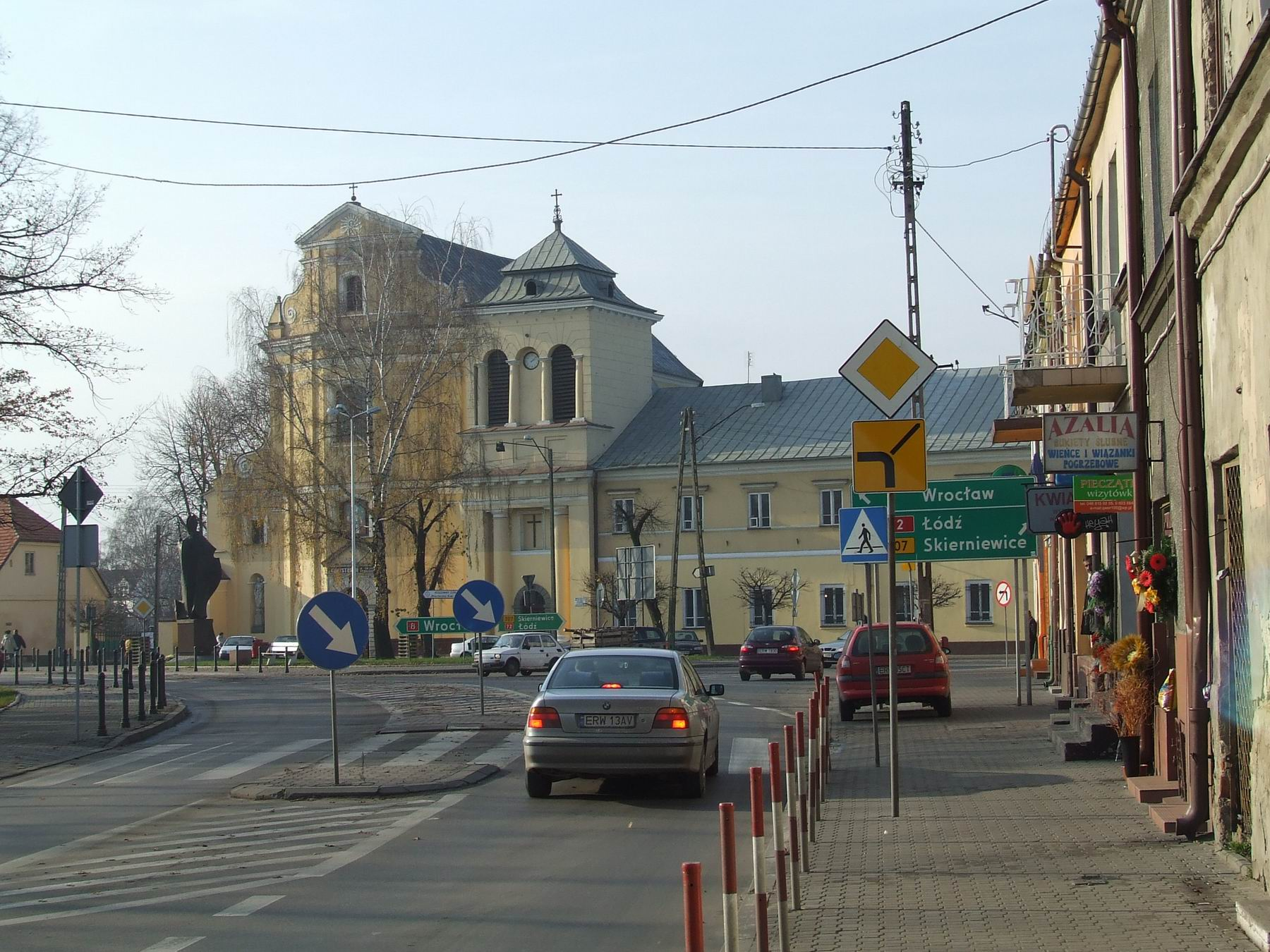 Rawa Mazowiecka, Plac Piłsudskiego